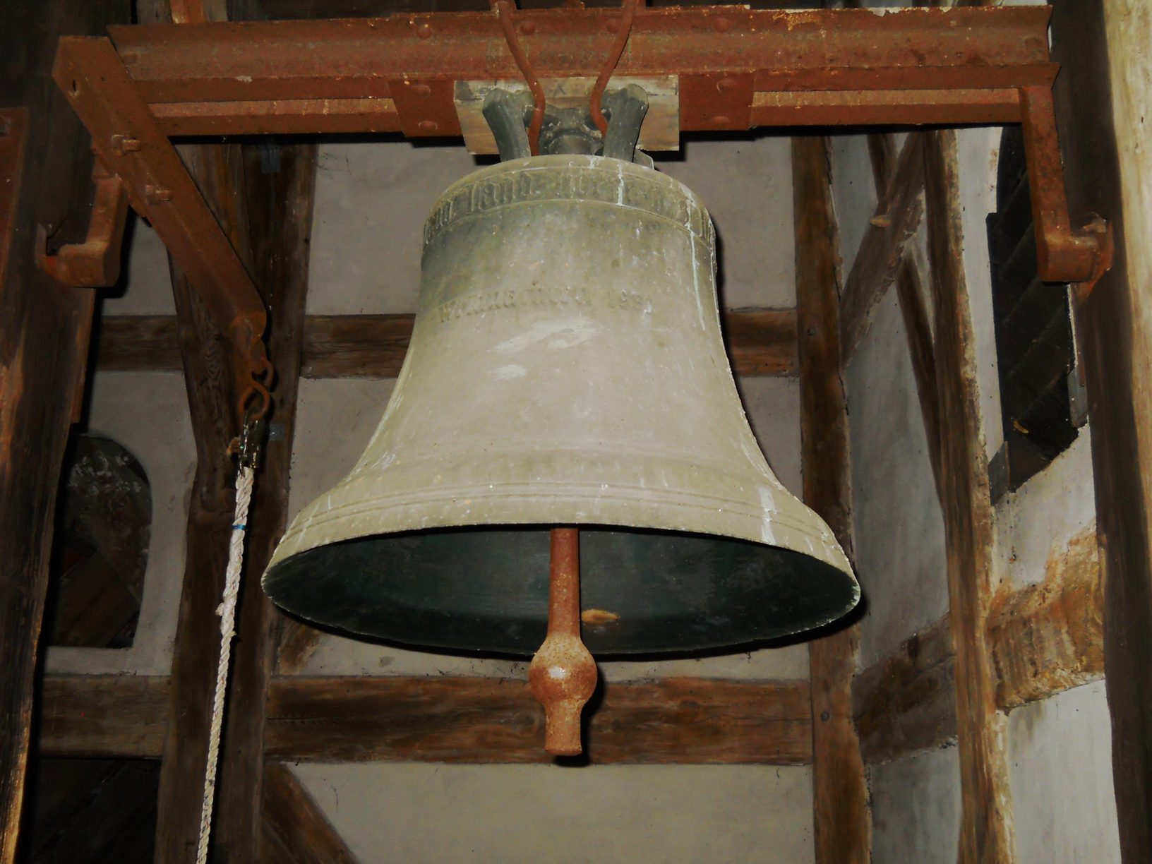 Kościół w Wojcieszycach. Dzwon.